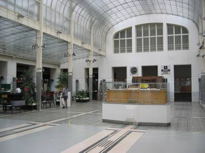 Wiener Postsparkasse by Otto Wagner, Kassensaal